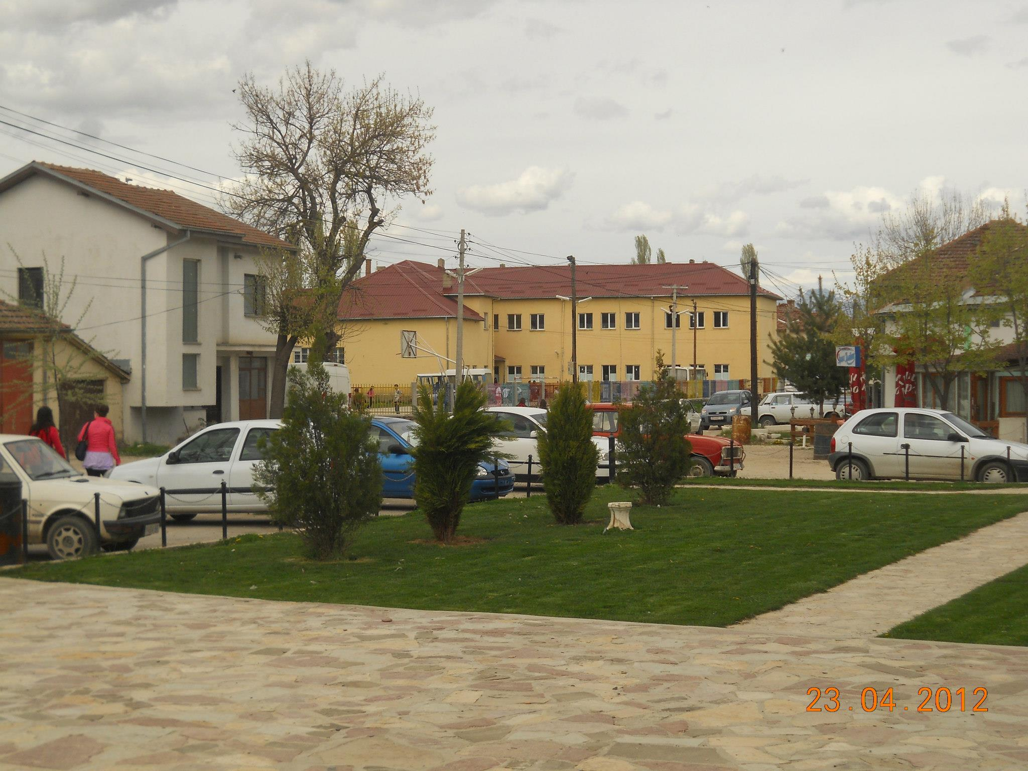 Централен ден на Кривогаштани